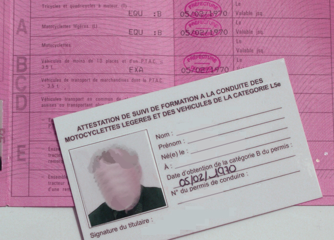 Attestation de formation 7 h pour la conduite en France d'une moto légère ou d'un tricycle L5e avec le permis B (auto), obtenue début 2011, nécessaire rétroactivement depuis le 1er janvier 2011, malgré l'équivalence reconnue sur ce permis de conduire datant du 5 février 1970